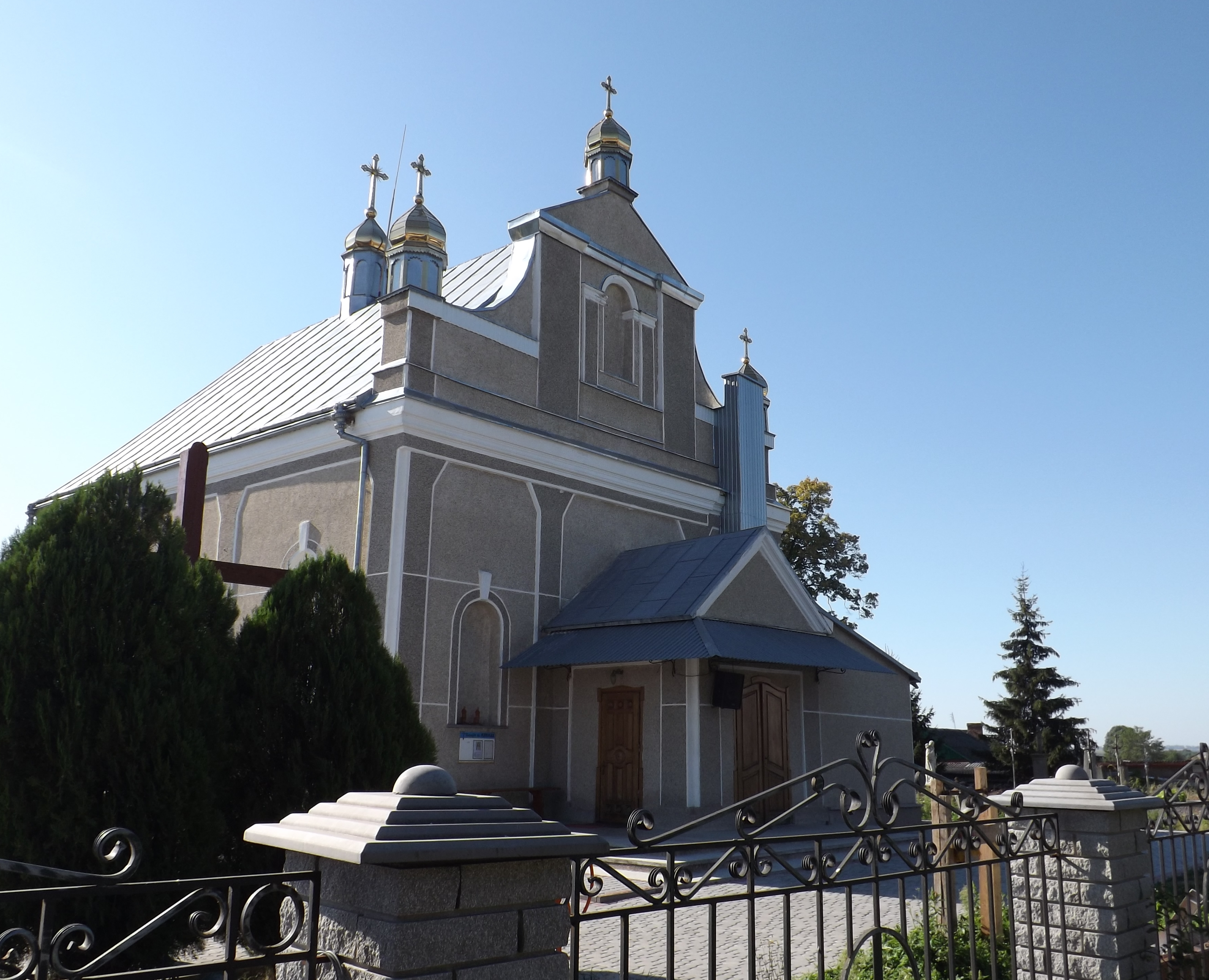 Церква св. Миколая в с. Староміщина Підволочиського району Тернопільської області, Україна (збудована в 1889 році)